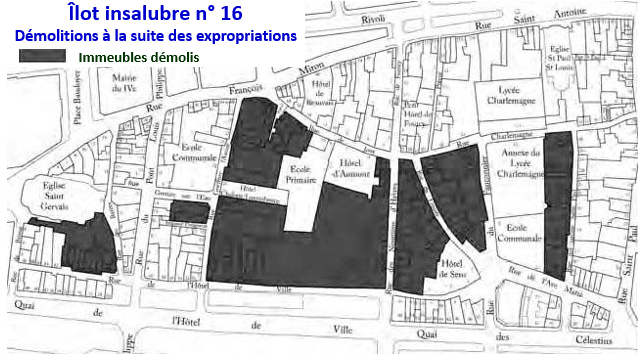 Démolitions dans l'îlot insalubre n° 16 suite à expropriations des années 1940